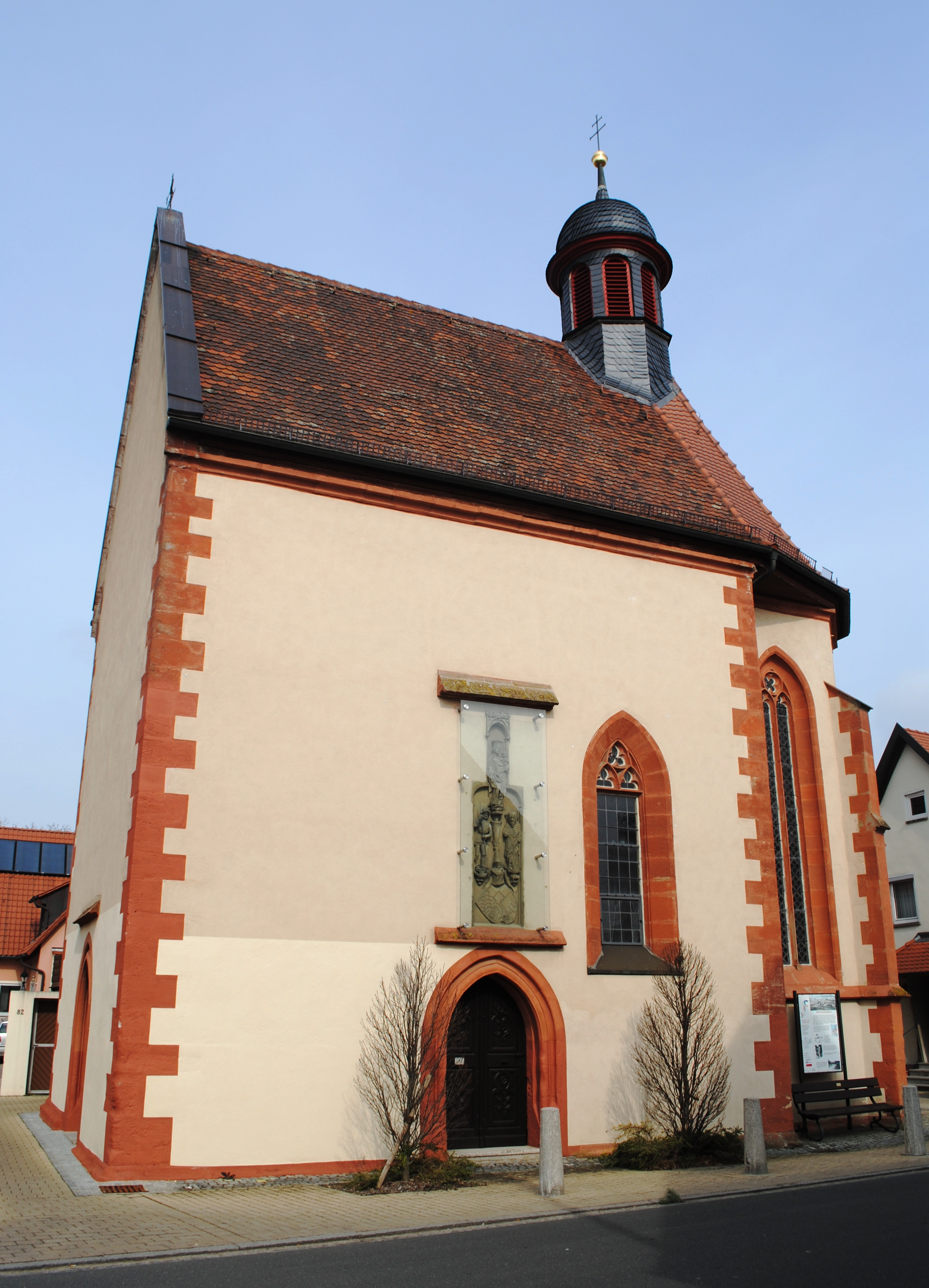 Antoniuskapelle, Großlangheim, Süden